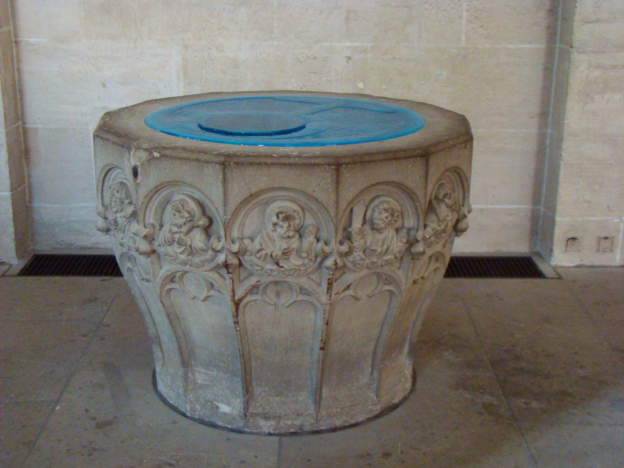 Bartholomäuskirche Markgröningen